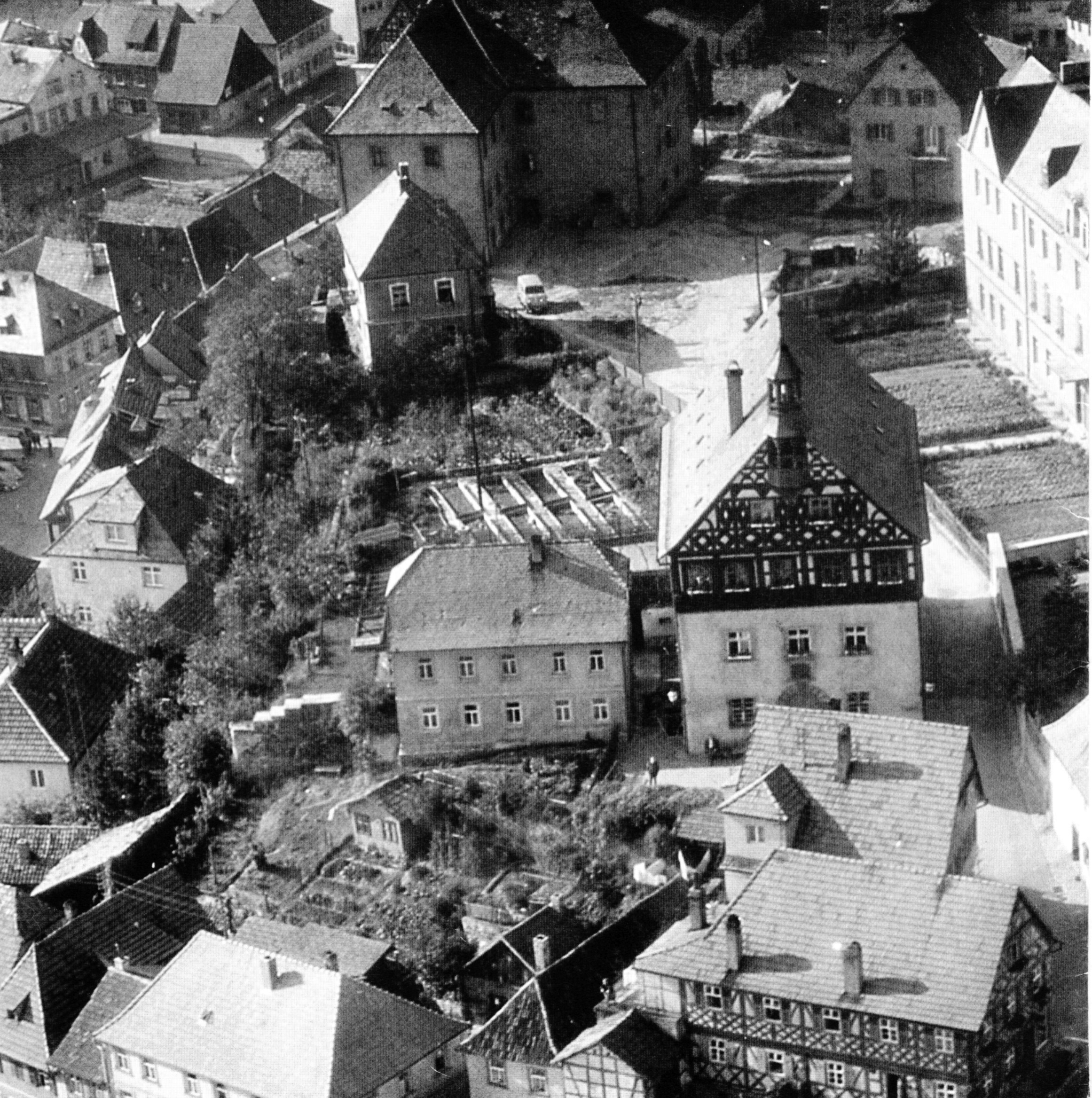 Das Rathaus und links daneben das Polizeidienershaus, in dem lange Zeit die Lanpolizeistelle sowie Ausnüchterungs- und Gefängniszellen waren.